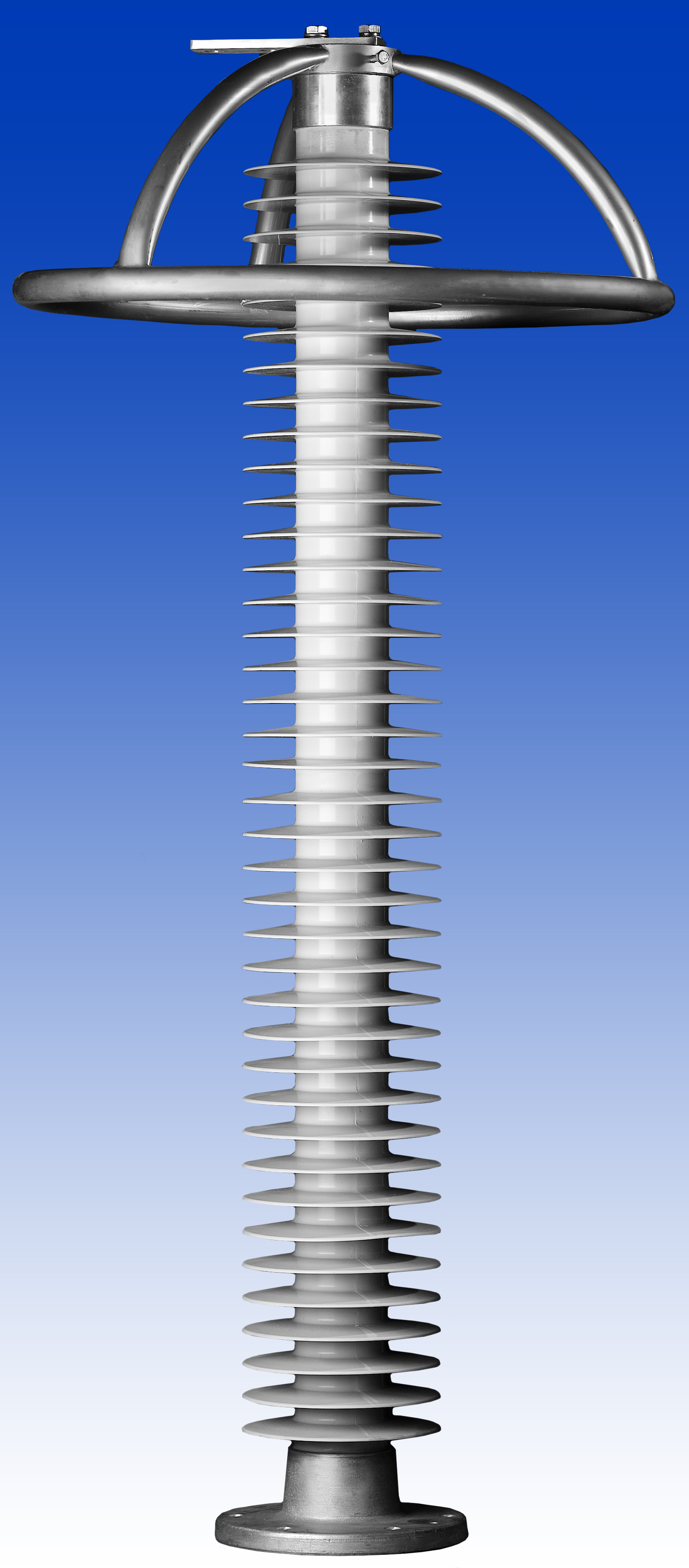 ОПН для сети 110 кВ